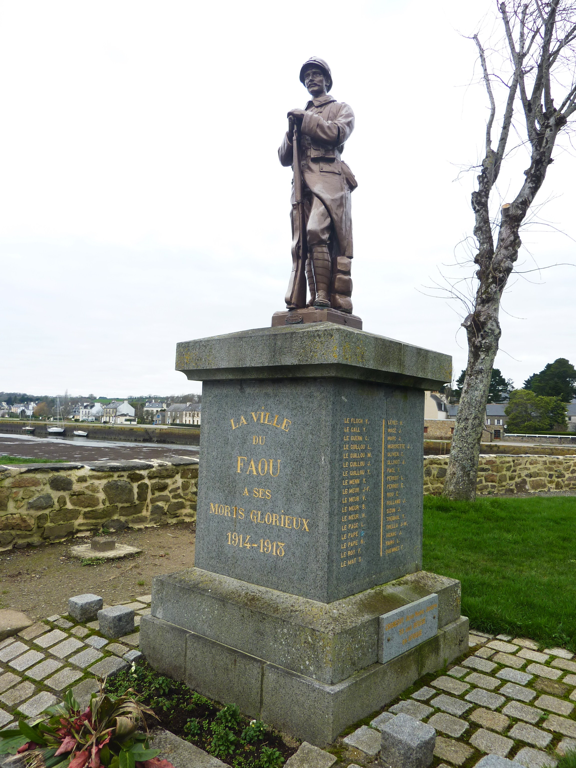 Le Faou : le monument aux morts